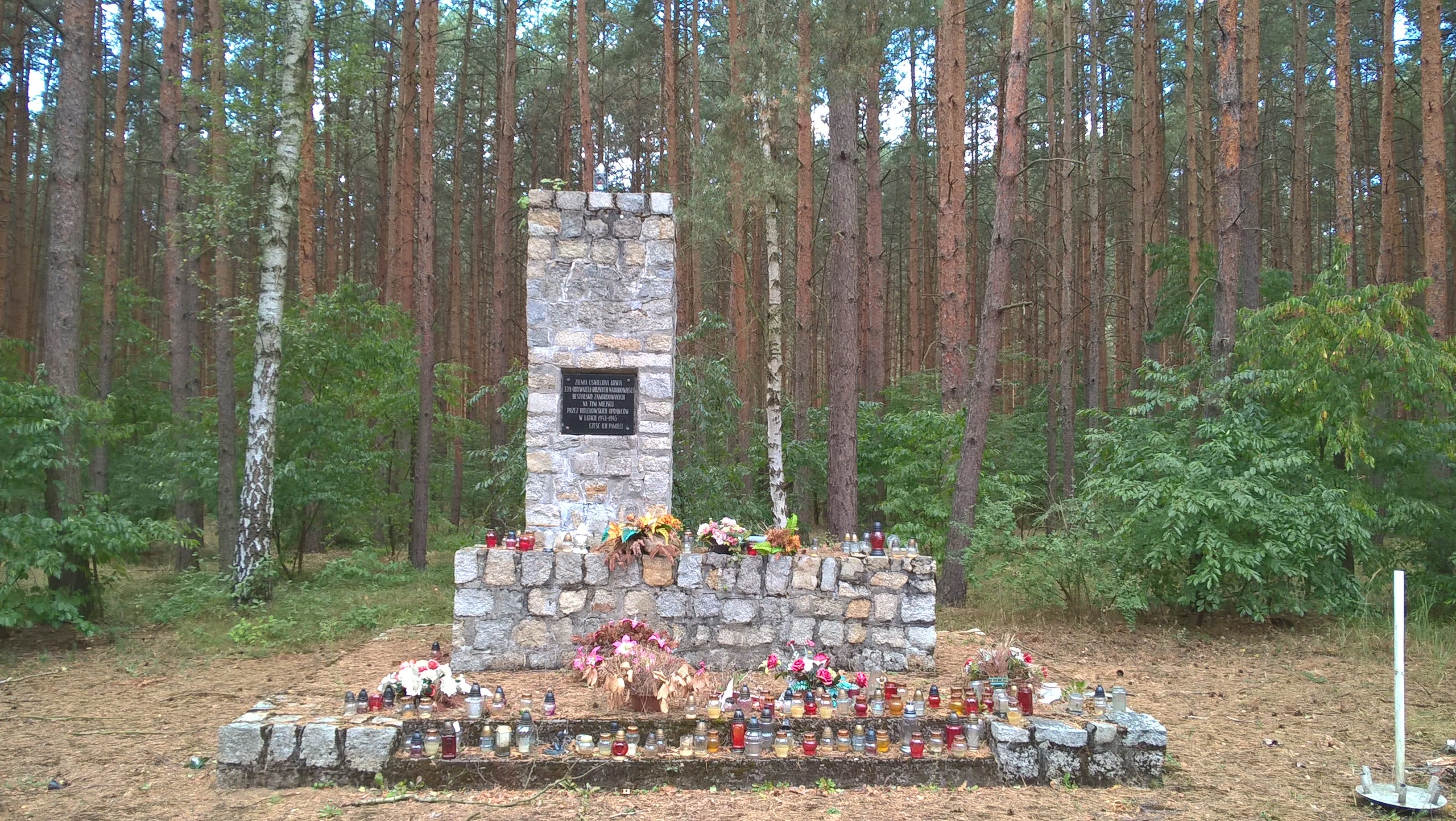 Pomnik na miejscu egzekucji 339 więźniów więzienia śledczego w Lesznie i mieszkańców Leszna w Lasach Rydzyńskich. Zmarłych ekshumowano w 1959 do mogiły przy cmentarzu miejskim w Lesznie ul. Kąkolewska